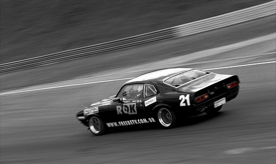 ford maverick en carrera